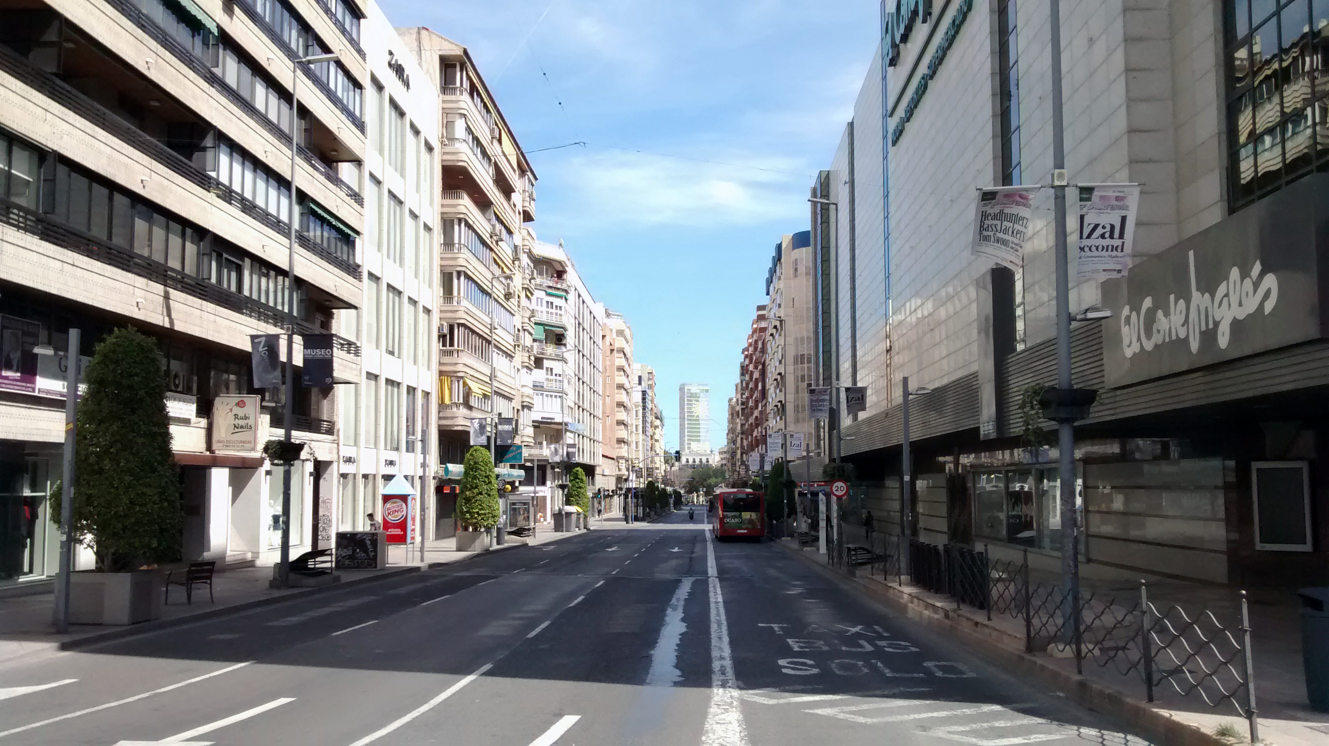 Avenida de Maissonave de Alicante (España) vista desde la Glorieta de la Estrella. Esta foto es especialmente inusual porque muestra la calle particularmente vacía, sin el bullicio habitual de coches y personas. Tomada el día de la mona (lunes) de 2016 a las dos y media del mediodía.